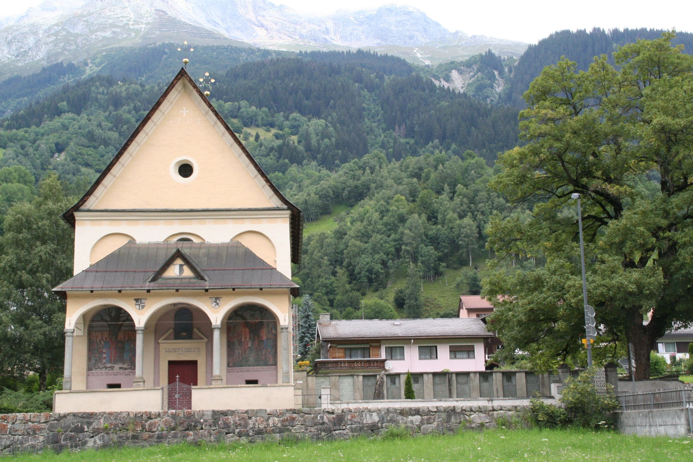 Caplutta Sontga Onna, rechts daneben der Ehrenhof und der Ahorn von Trun Ansicht von S